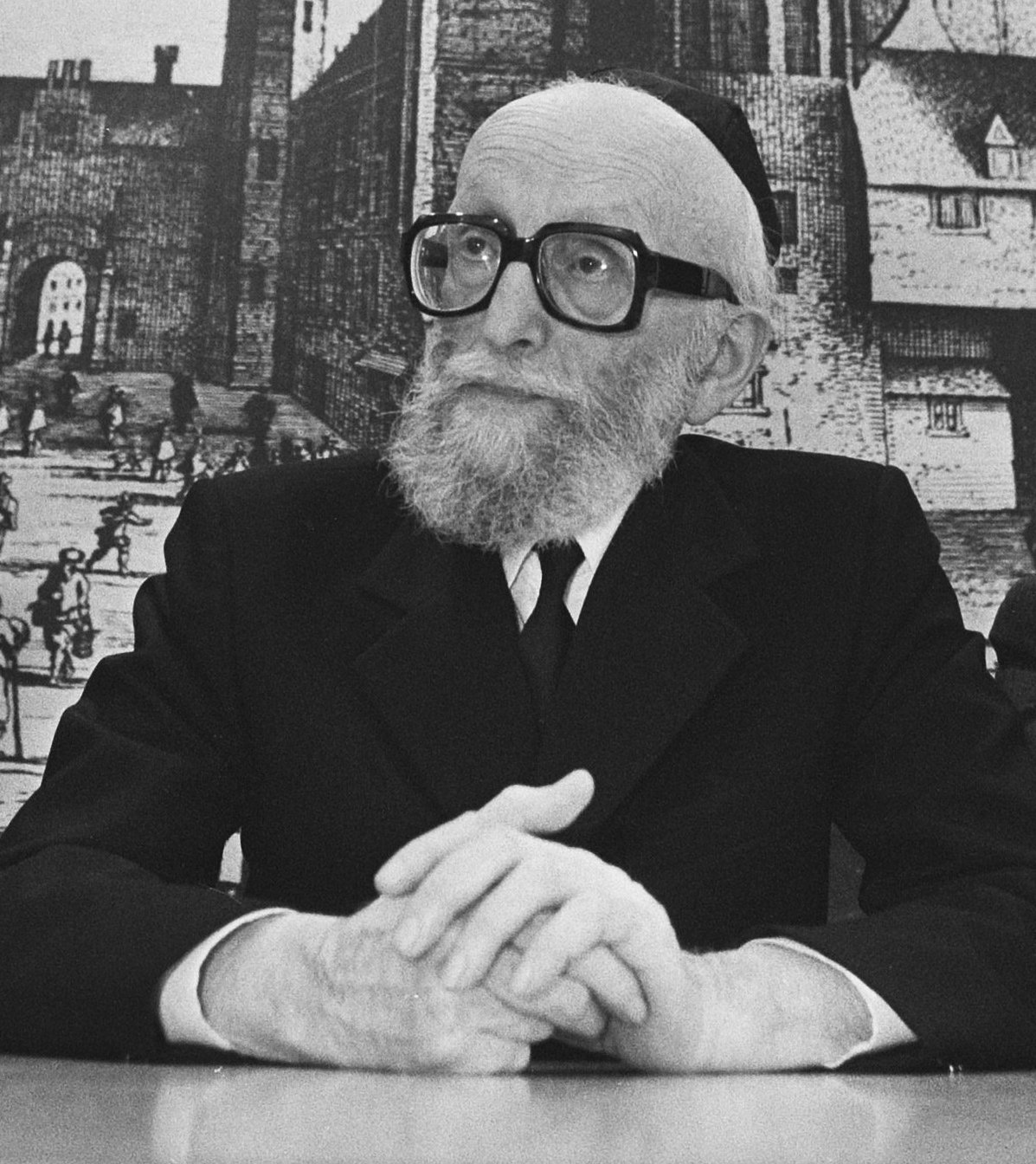 Collectie / Archief : Fotocollectie Anefo Reportage / Serie : Persconferentie van rabbijnen na het bezoek aan de plaatsvervangende Pauselijke Nuntius. Aanleiding was het protest tegen de ontvangst van PLO-leider Arafat door de Paus Beschrijving : V.l.n.r. de rabbijnen E.A. Rodrigues Pereira, Just en Arjeh Ralbag Datum : 14 september 1982 Trefwoorden : jodendom, persconferenties, rabbijnen Persoonsnaam : Just, M., Ralbag, A.L., Rodrigues Pereira, E.A. Fotograaf : Croes, Rob C. / Anefo Auteursrechthebbende : Nationaal Archief Materiaalsoort : Negatief (zwart/wit) Nummer archiefinventaris : bekijk toegang 2.24.01.05 Bestanddeelnummer : 932-3241